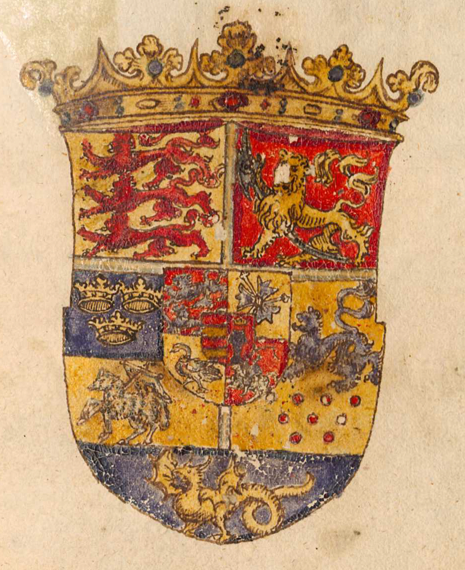 Wappen des König Christian IV. von Dänemark und Norwegen (König 1588-1648) Feld 1: Drei Löwen (Dänemark. Die roten Herzen sind allerdings nicht zu erkennen und die Farbe müsste blau, nicht rot sein) Feld 2: Axttragender Löwe (Norwegen). Feld 3: Drei Kronen (Schweden) / Agnus Dei (Gotland, müsste in Rot sein) Feld 4: Löwe über neun Herzen („König der Goten“) Feld 5: Lindwurm für den „König der Wenden“ (müsste dann in Rot sein) Mittelschild: Feld 1: Zwei Löwen (Schleswig) (müsste Blau in Gold sein) Feld 2: Nesselblatt (Holstein, ursprünglich Schauenburg bzw. Schaumburg) (müsste in Rot sein) Feld 3: Schwan mit Krone um den Hals (Stormarn) (müsste in Rot sein) Feld 4: Ritter (Dithmarschen) Herzschild: heraldisch links: gekrönter Stockfisch (Island); heraldisch rechts: Balken (Oldenburg. Das oldenburger Wappen müsste gold mit zwei roten Balken sein)